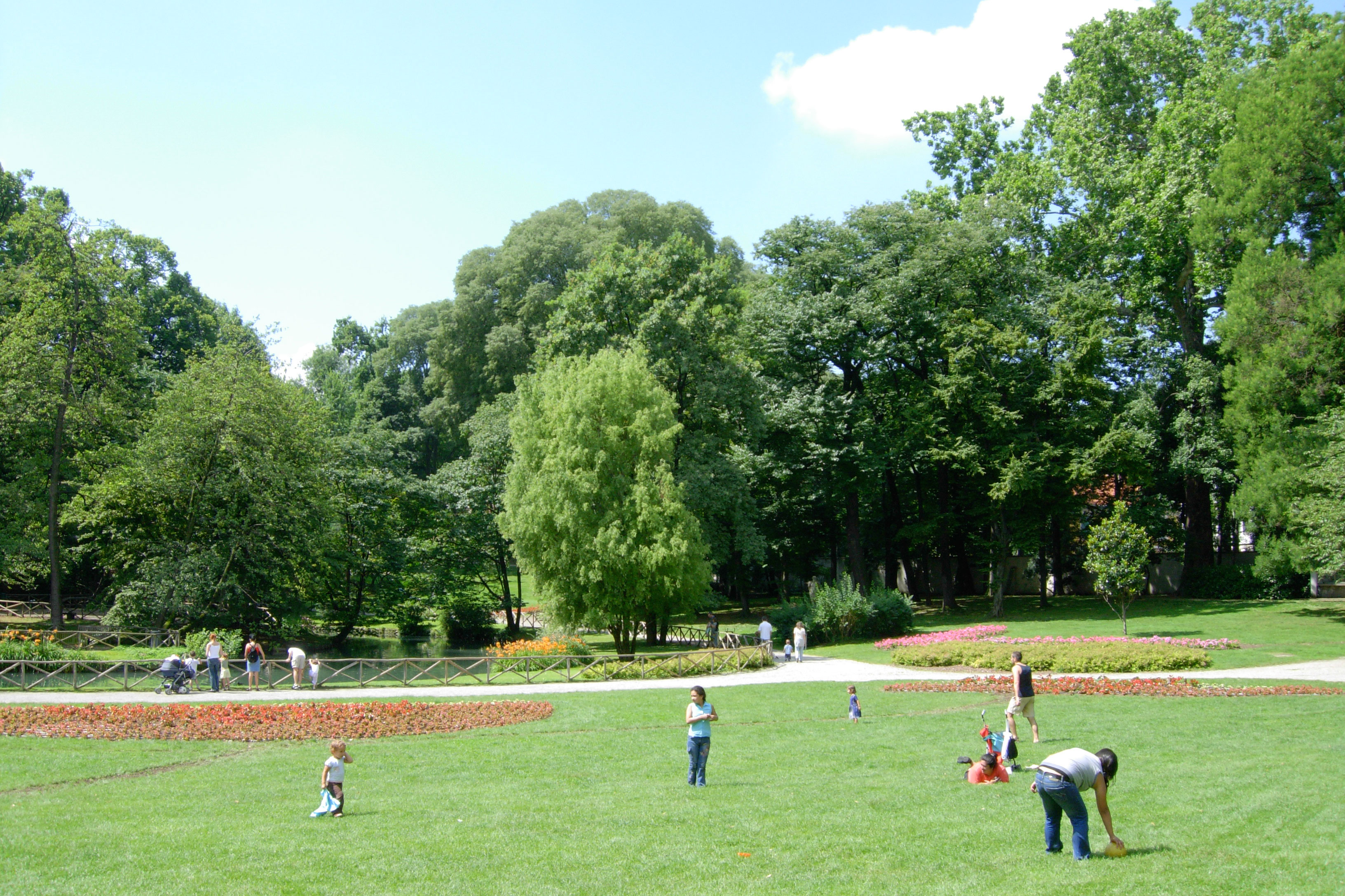 Garden of Villa Belgioioso Bonaparte, Villa Reale, Milano Italia